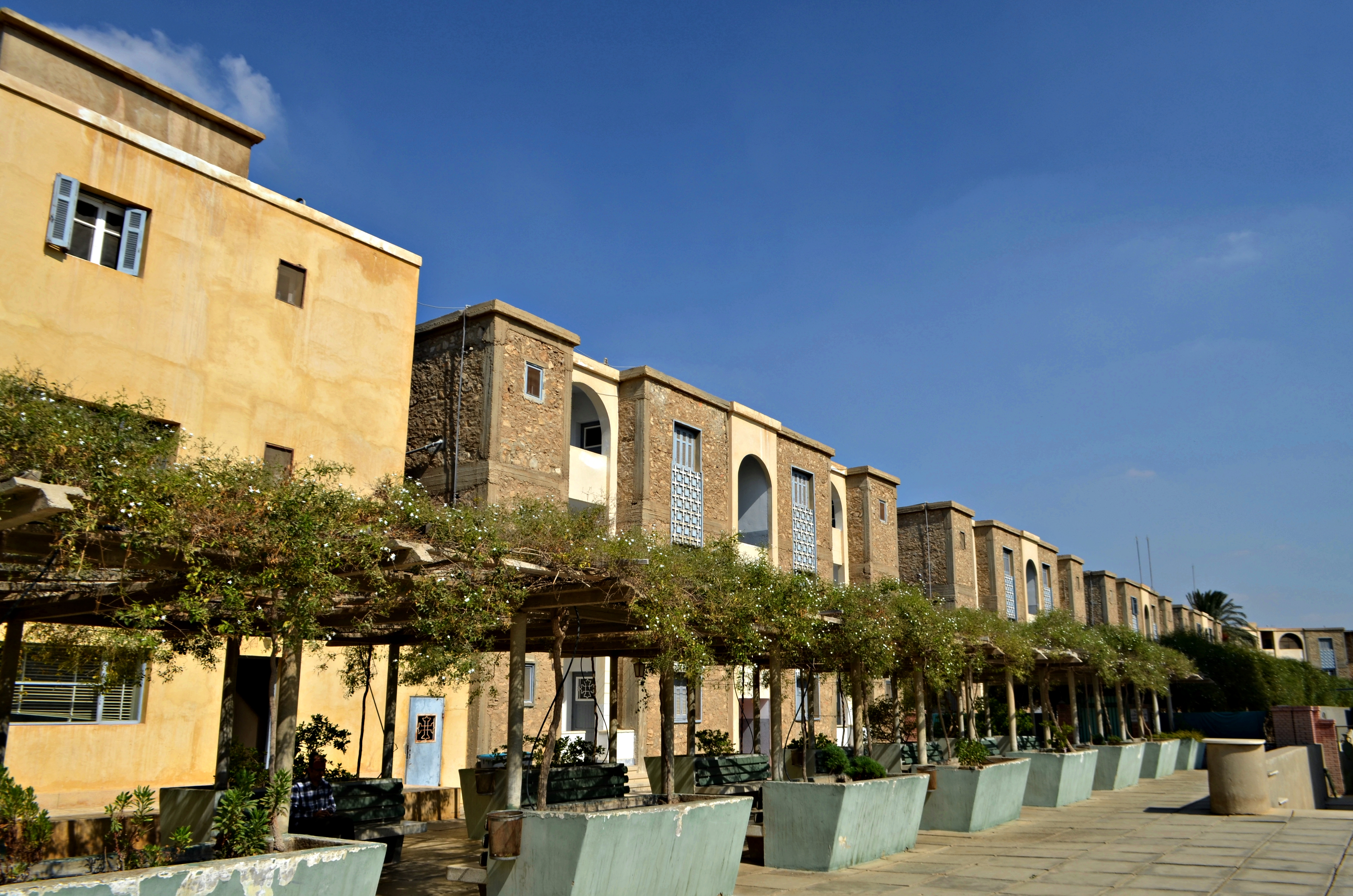 دير القديس الأنبا مقار الكبير، وادي النطرون، محافظة البحيرة، مصر